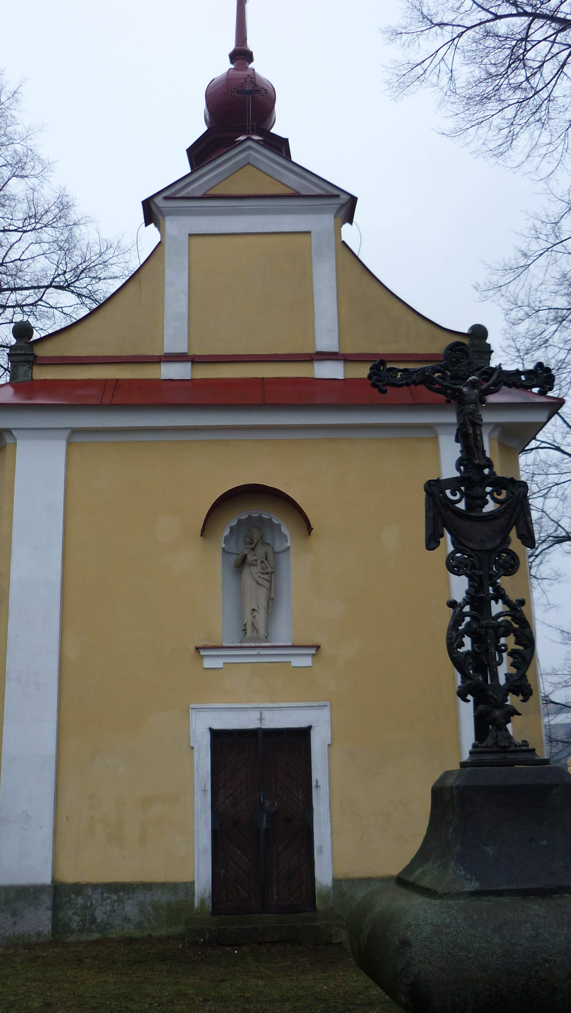 Kaple Zvěstování P. Marie (Náchod), Náchod-Plhov